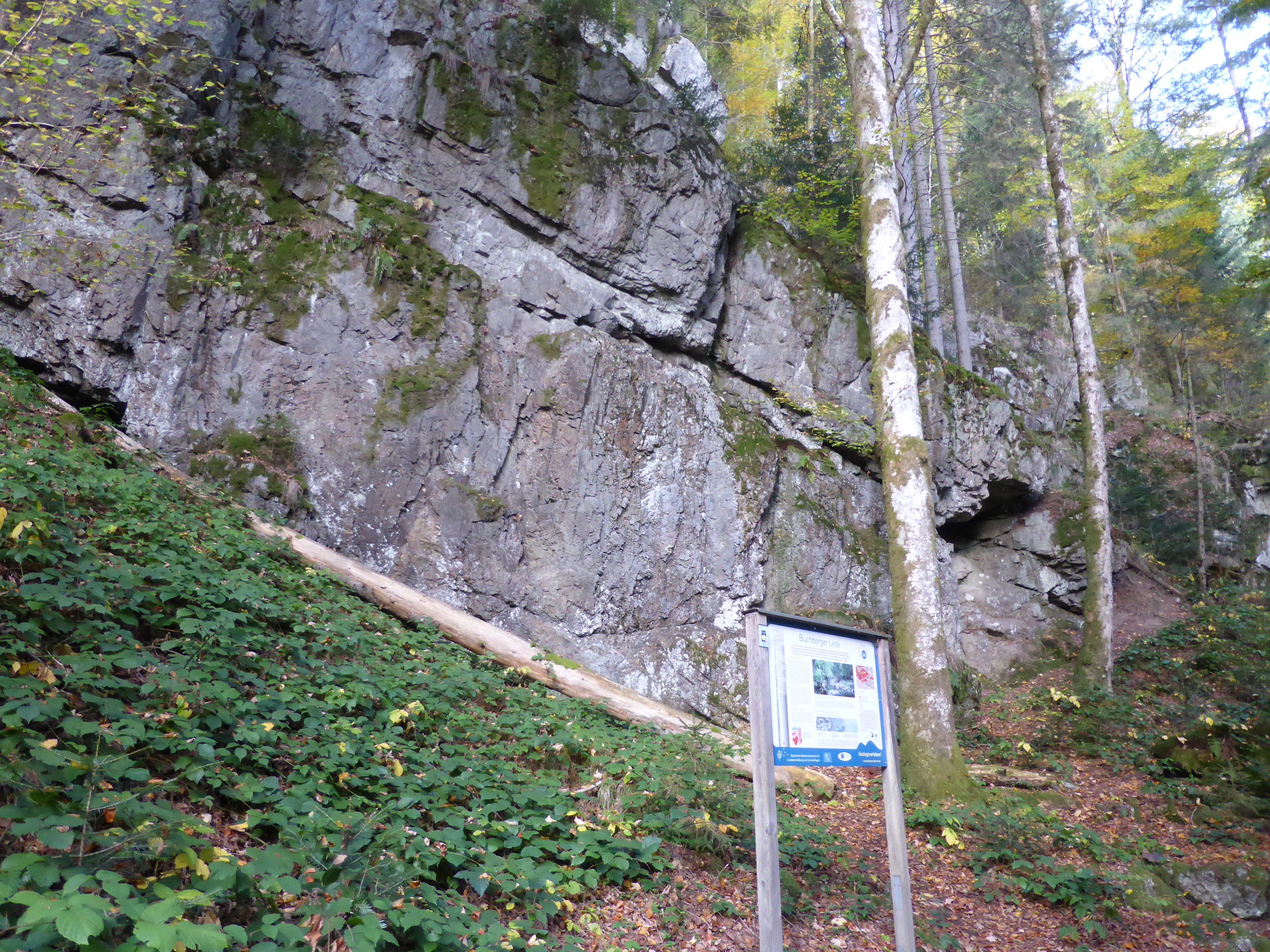 Felswand in der Buchberger Leite zwischen den Orten Freyung und Ringelai mit einer Informationstafel zur Geologie. Geotop im Landkreis Freyung-Grafenau.